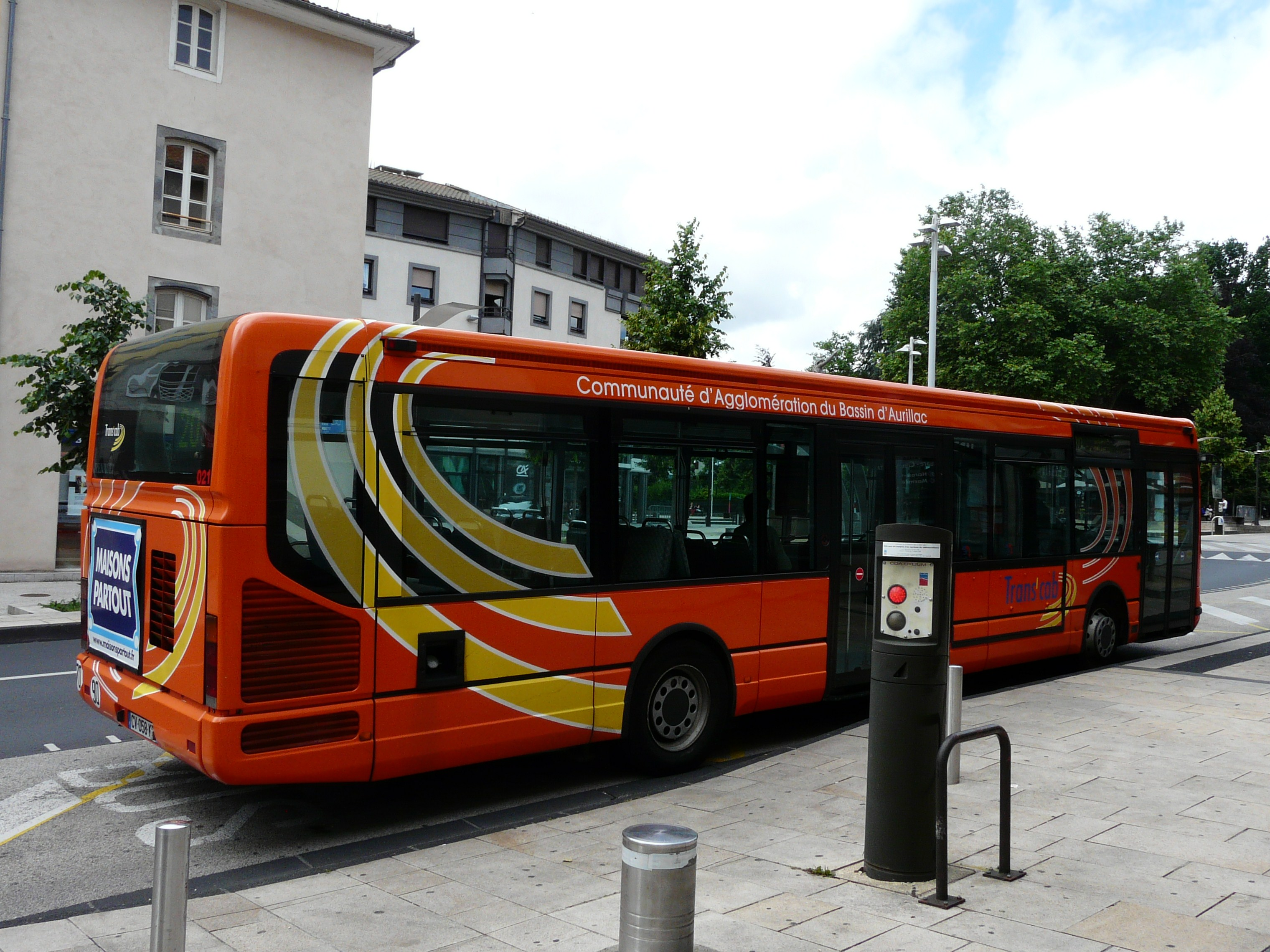 Bus de la communauté d'agglomération du Bassin d'Aurillac, Aurillac, Cantal, France.